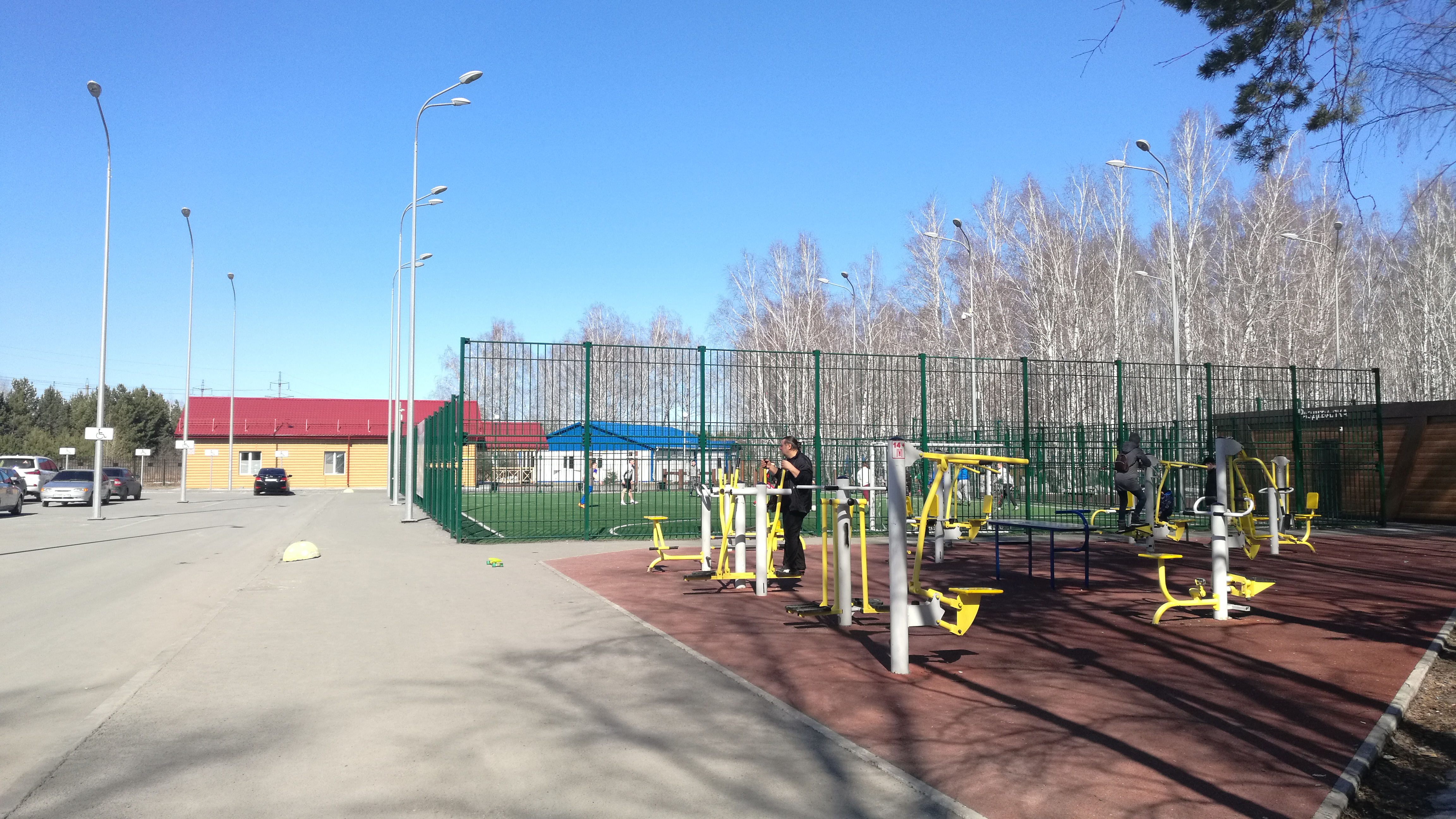 Gilova bosko. Tjumeno, Rusio.